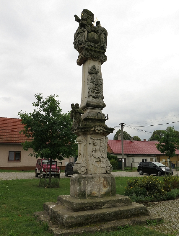 Sousoší Nejsvětější Trojice, při poště, Třebařov.